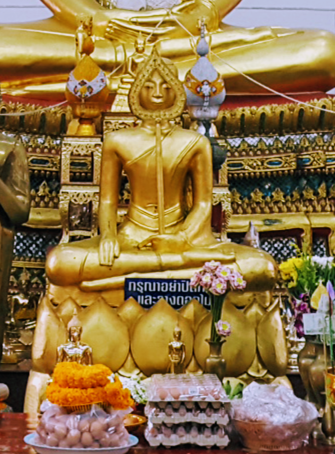 พระพุทธรูปปางประธานธรรม ในวัดศเวตฉัตรฯ